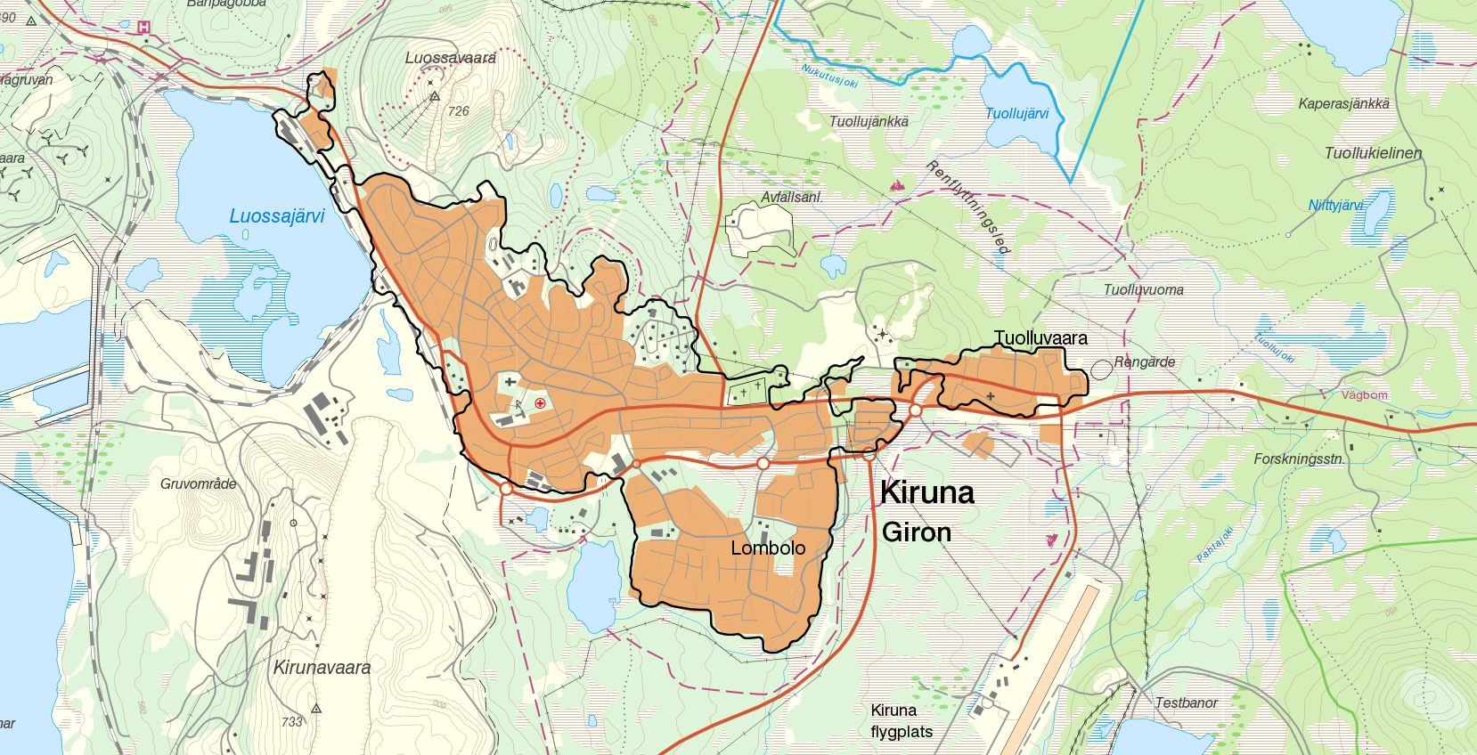 Tätorterna Kiruna och Tuolluvaara med gränserna från Statistiska centralbyråns tätortsavgränsning 2015. Bakgrundskarta från Lantmäteriet, skala 1:30 236.